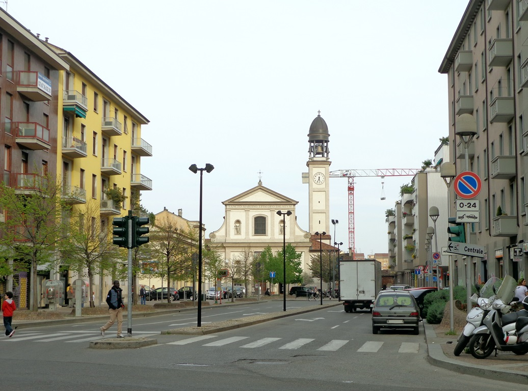 Milano, piazza Greco, centro dell'omonimo quartiere.